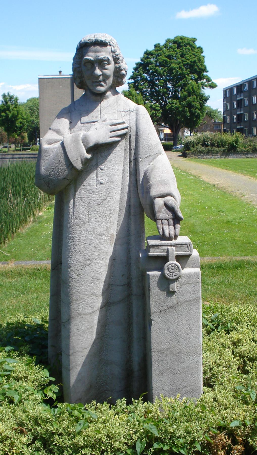 Voorburg, Park 't Loo/Spinozalaan. Kunstwerk "Benedictus de Spinoza" van Rudolf Roth. The Netherlands. FOP.